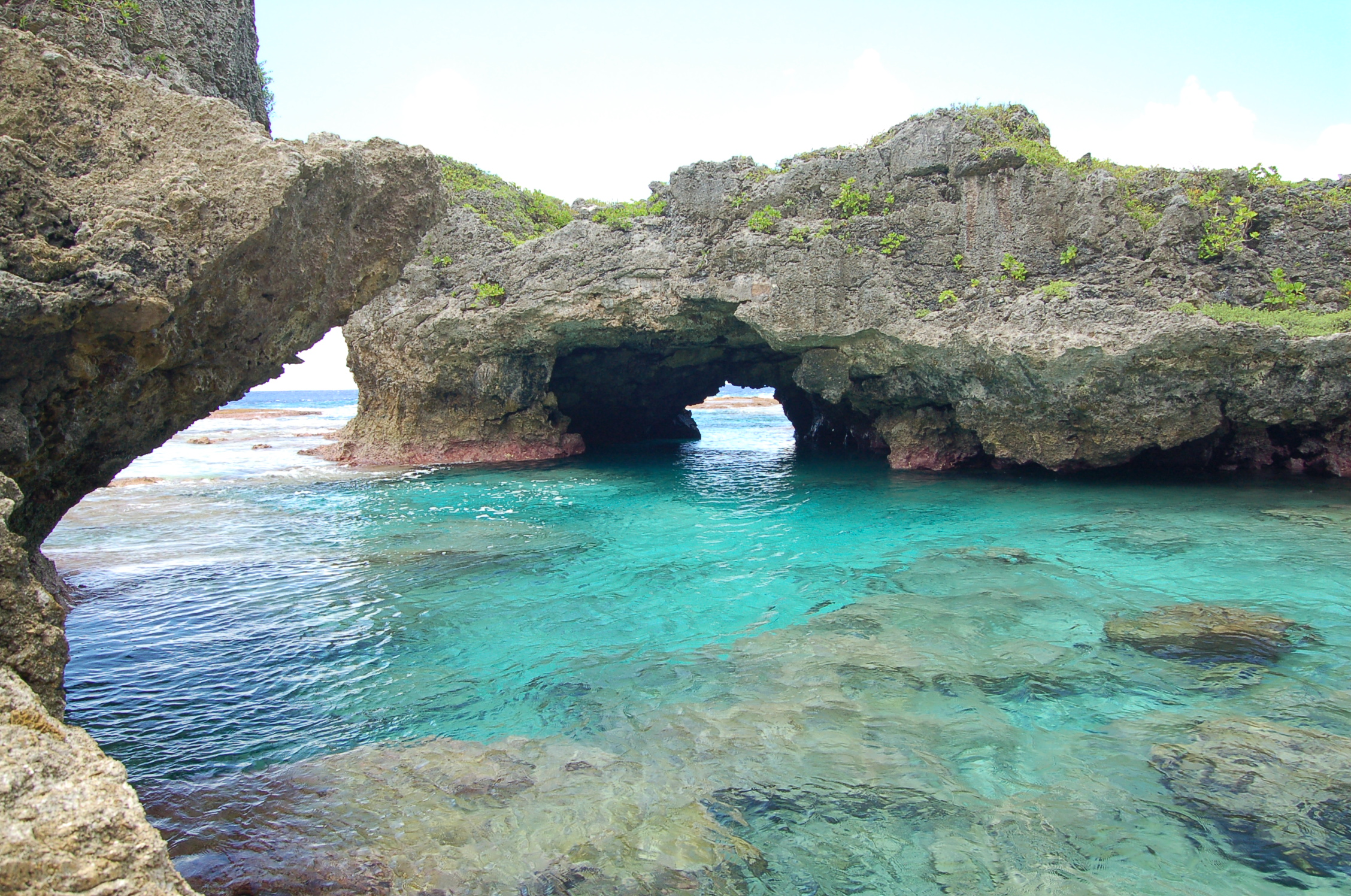 Erosionserscheinungen an der Nordküste Niues